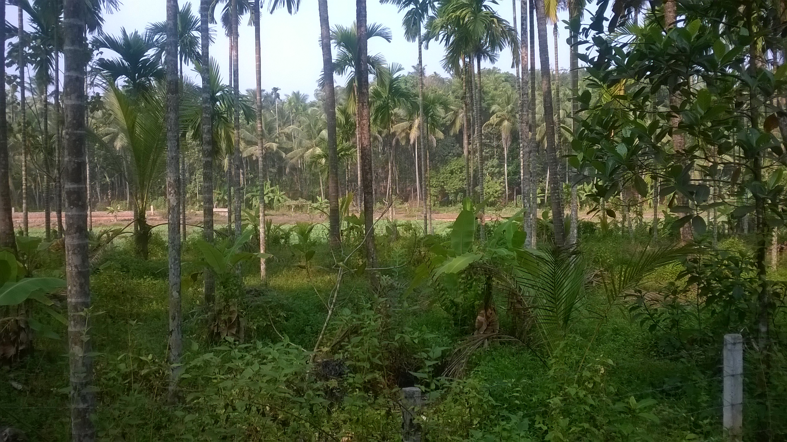 നരയംകുളത്തെ ഒരു വയൽ പ്രദേശം